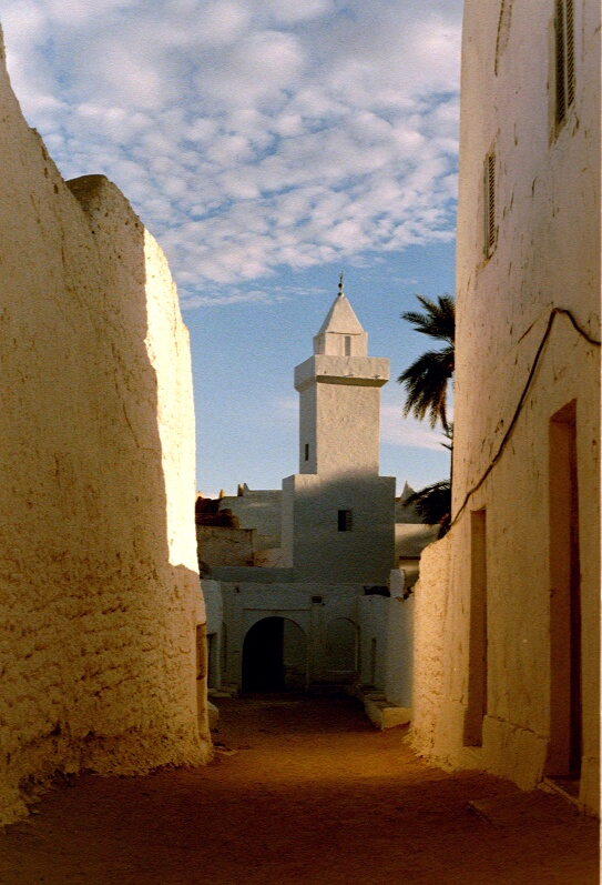 Gasse in der Altstadt von Ghadames in Libyen (Selbst fotografiert, 2000)